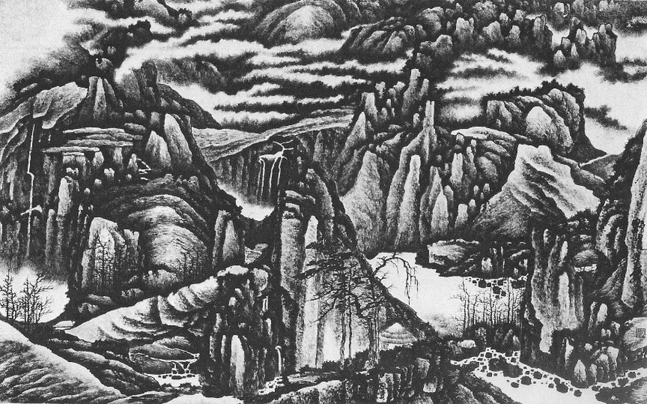 Mille pics et Ravins en myriades du peintre chinois Gong Xian, (actif env. 1660-1700). Signé par le sceau de l'artiste. Section d'un rouleau en longueur. Encre sur papier. H. 62cm, L. 102cm. Zurich. Rietberg Museum, Collection Charles Drenowatz